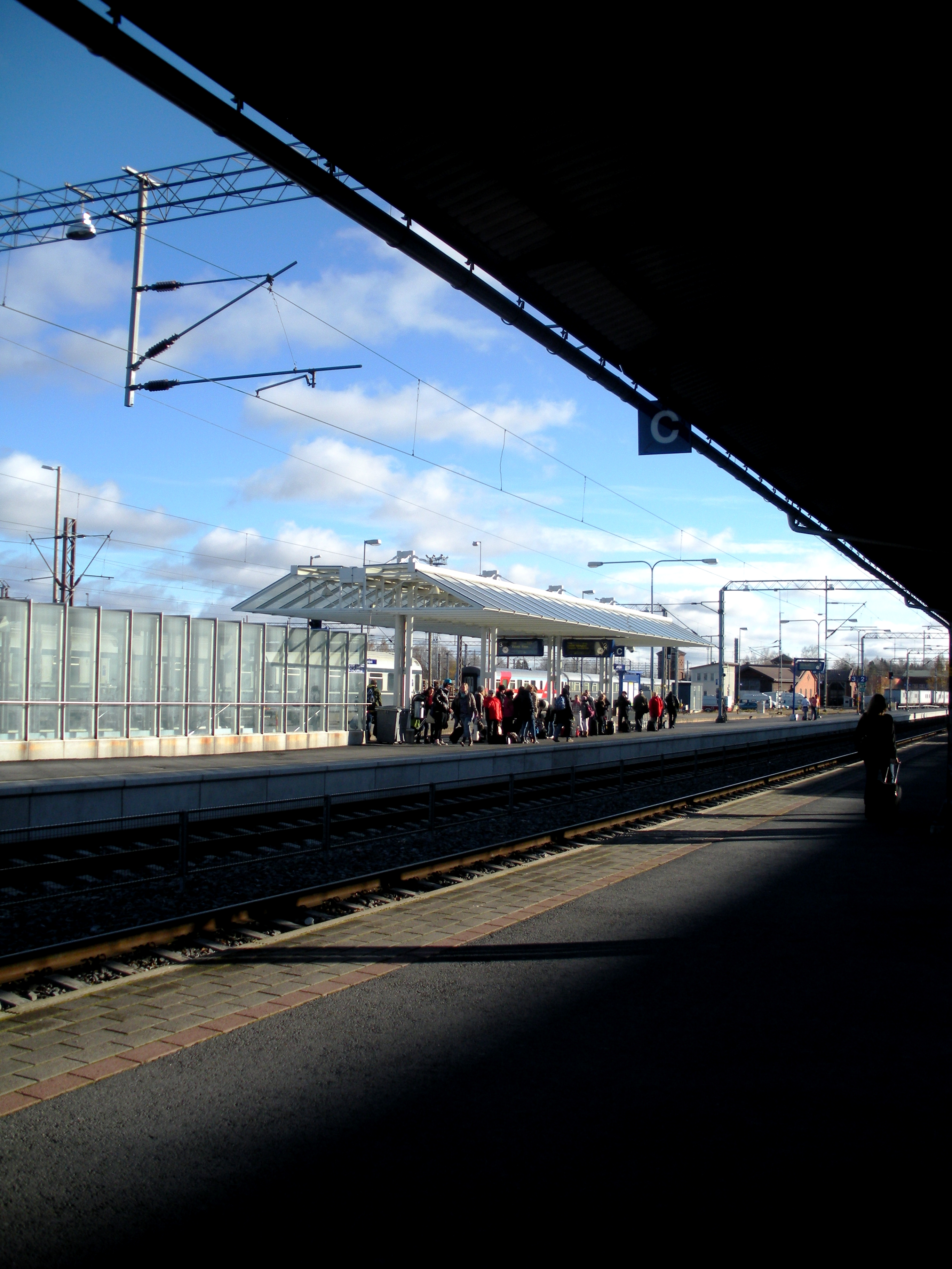 Seinäjoen rautatieasema, asemalaituri